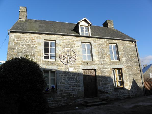 Mairie de Poilley (35).